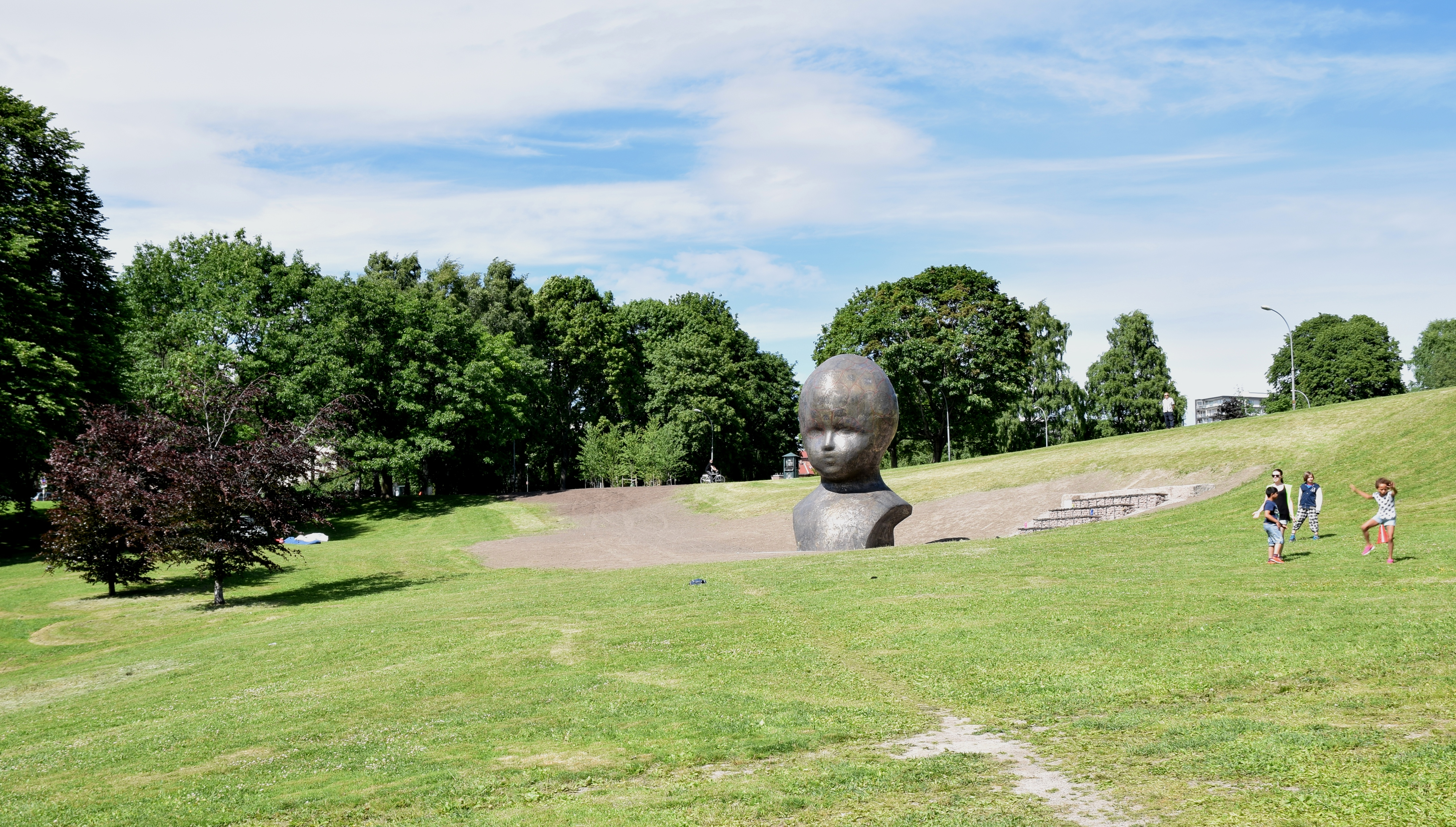 Torshovdalens midtre part. «Hode» av Marianne Heske, avduket i juni 2014, sees i midten av bildet.